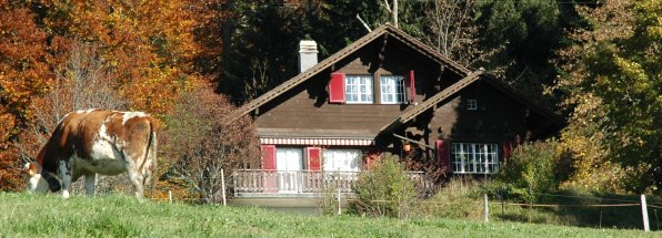 Un chalet près du lac Léman. Pris en Octobre 2004, au Mont-Pélerin, dans le canton de Vaud, près de Vevey. La photo est libre de droits, puisque prise par moi-même.